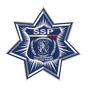 Escudo perteneciente a la Policía Estatal de San Luis Potosí